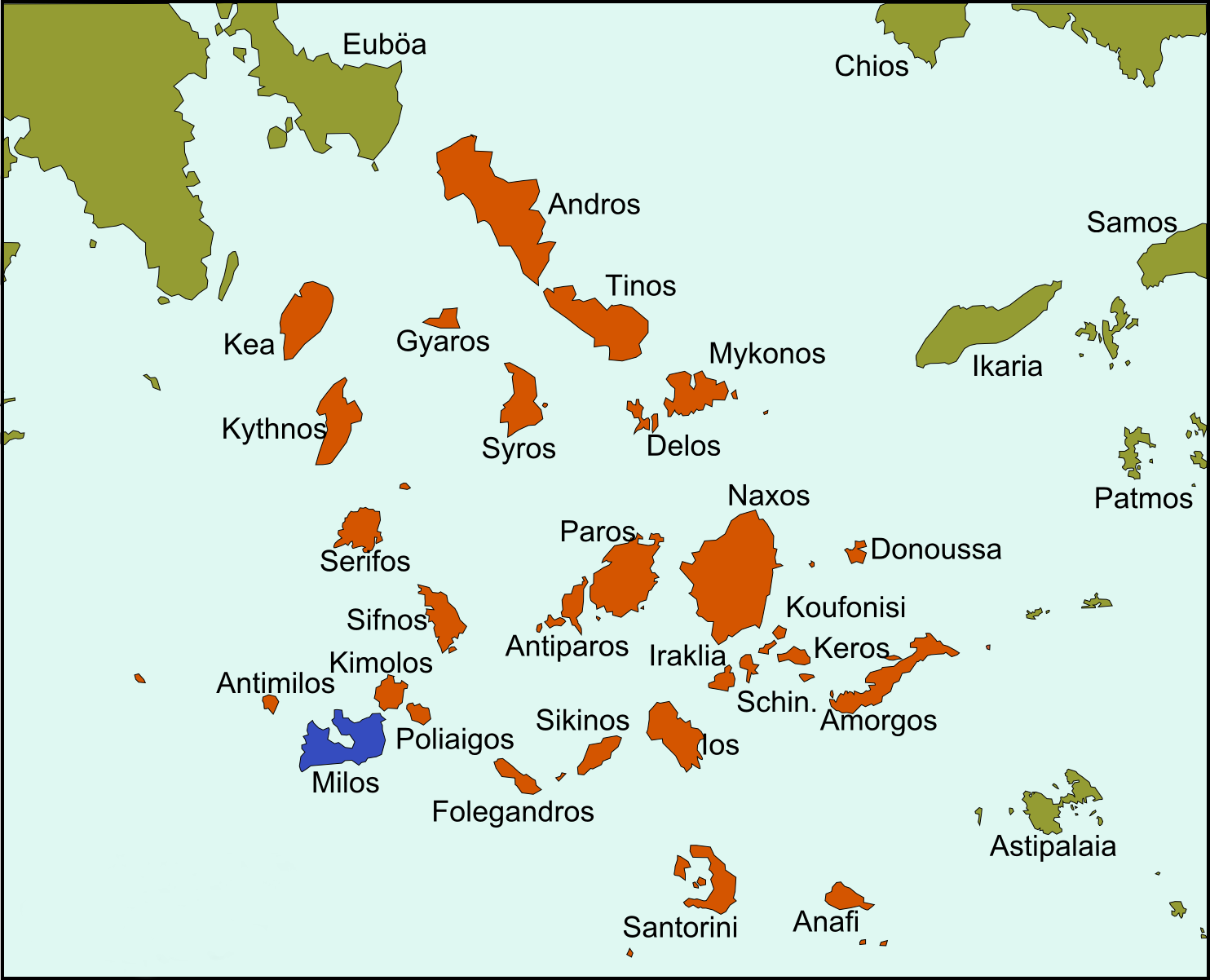 Lage der Insel Milos in den Kykladen